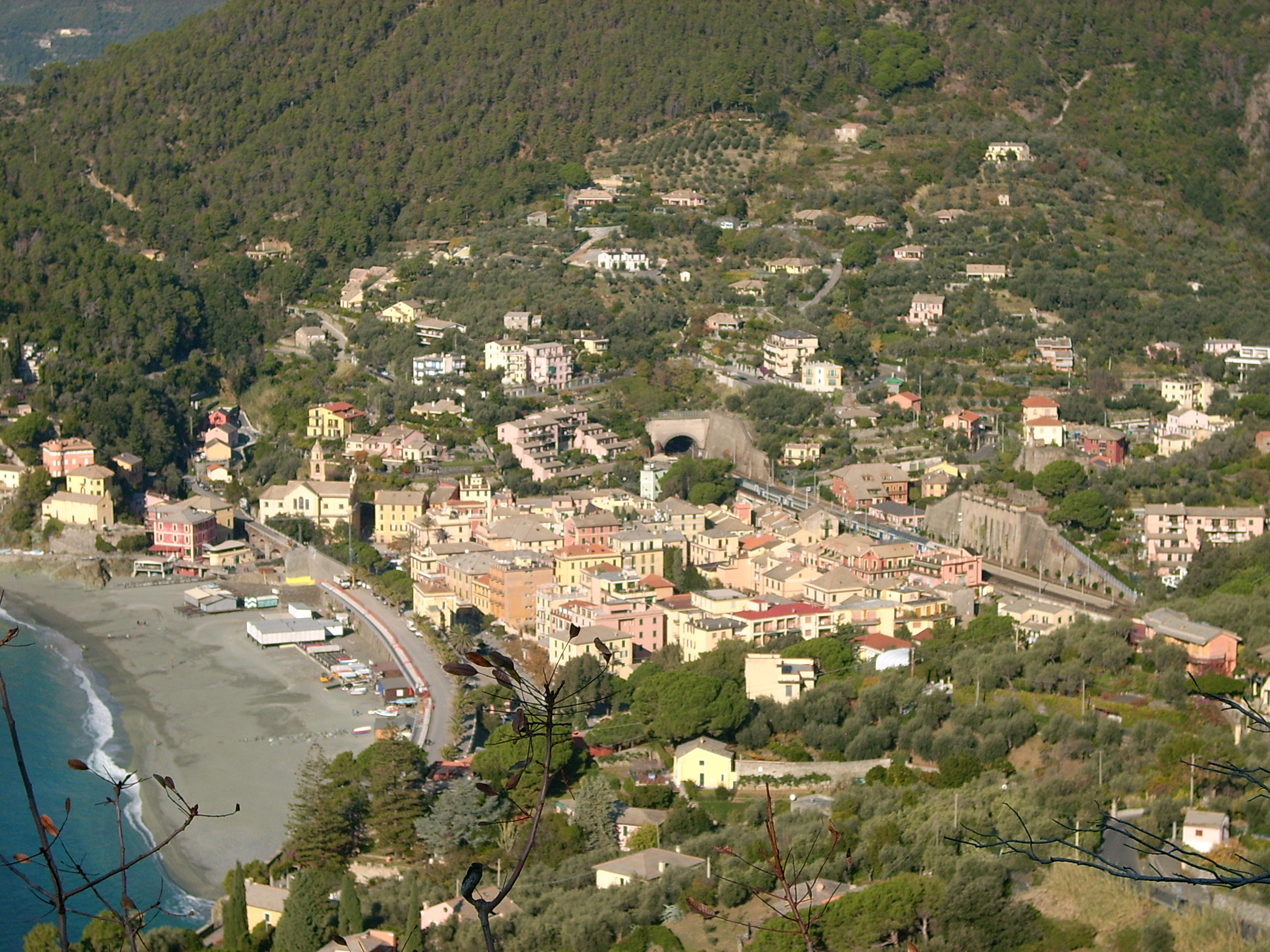 Bonassola, Liguria, Italia